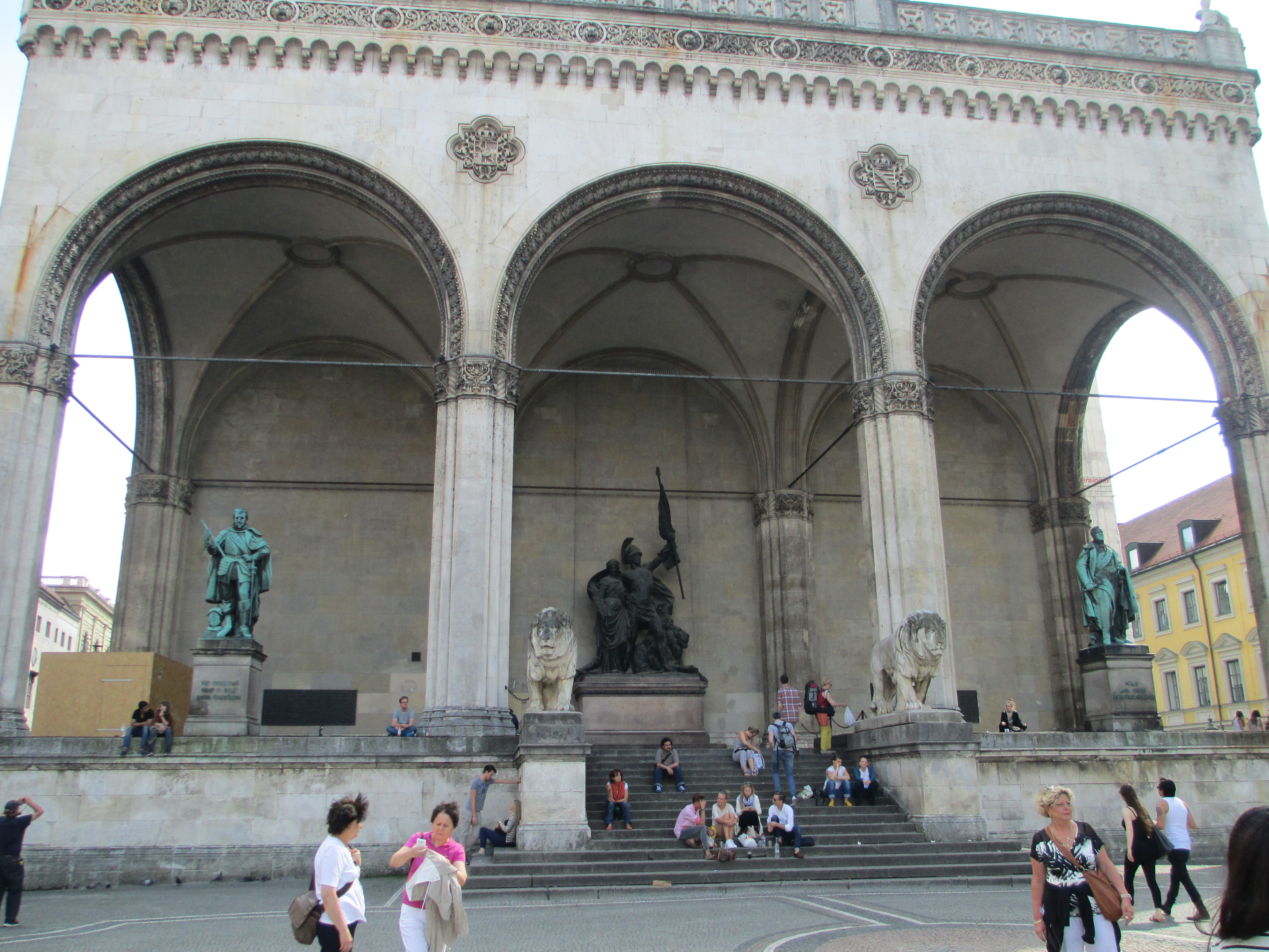 היכל המפקדים במינכן